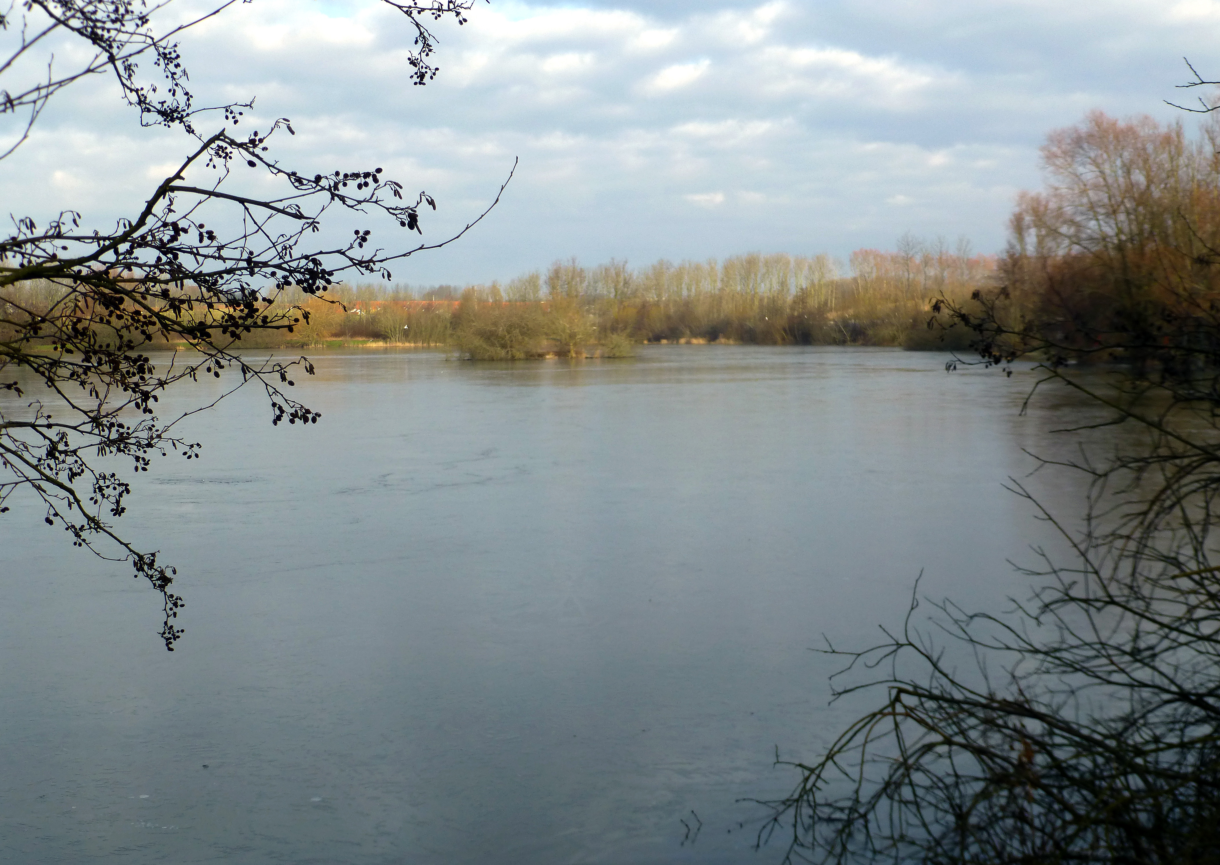 Tranbjerg sø set fra syd